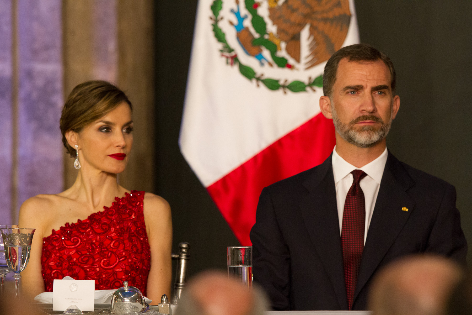 Sus Majestades los Reyes de España, Felipe VI y Letizia, en la cena en su honor celebrada en el Palacio Nacional de la Ciudad de México el 29 de junio de 2015.